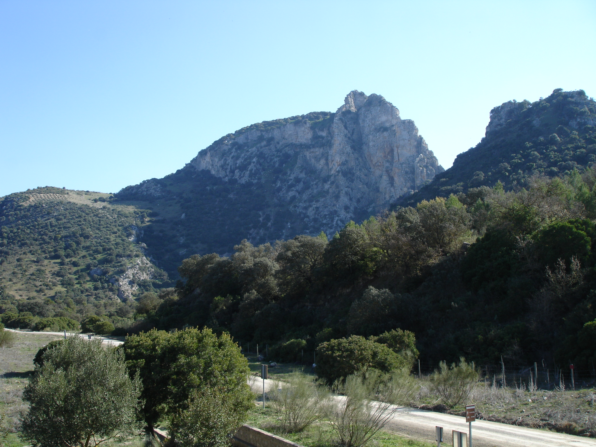 Peñón de Zaframagón desde el Centro de Interpretación y Observación de Buitres de Zaframagón, en la Vía Verde de la Sierra.